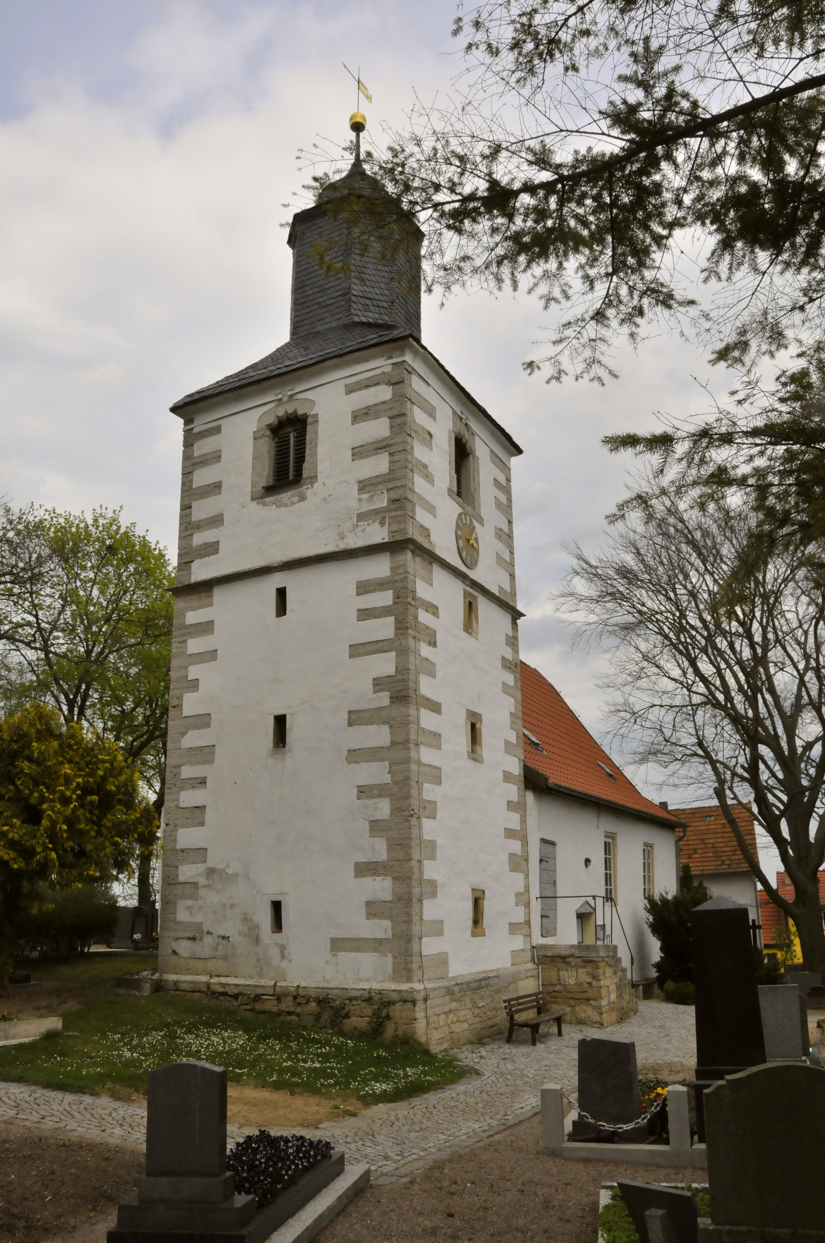 Eckardtsleben, Kirche, SW-Ecke